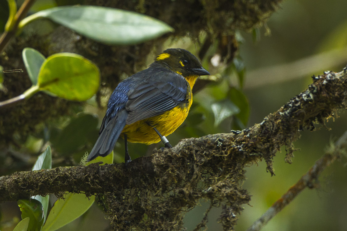 Lacrimose Mountain-Tanager - Colombia_S4E2958